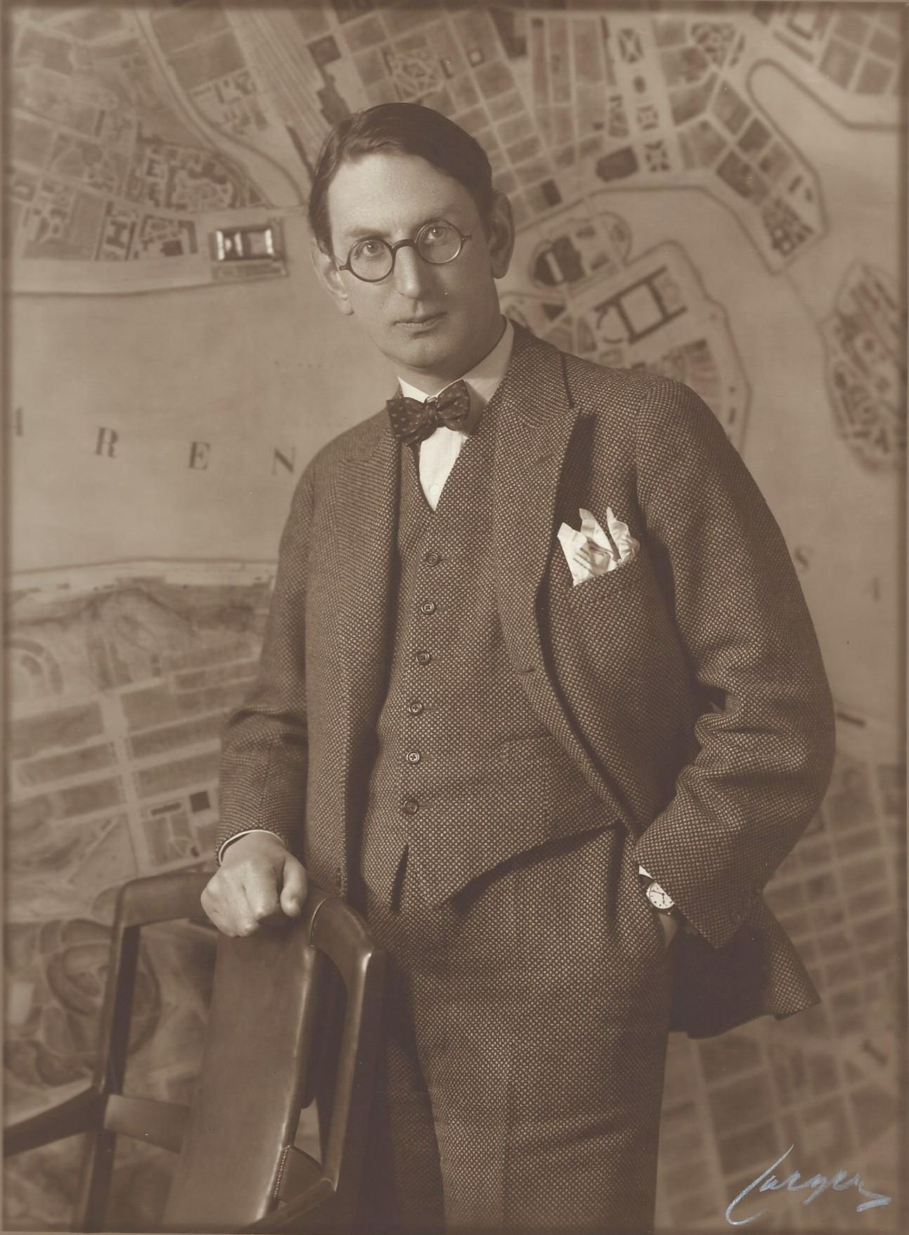 Borgarrådet Yngve Larsson, porträtterad av Atelier Jaeger för Hvar 8 dag (nr 13 mars 1931), framför en karta av Stockholm. Möjligen i Stockholms stadshus.